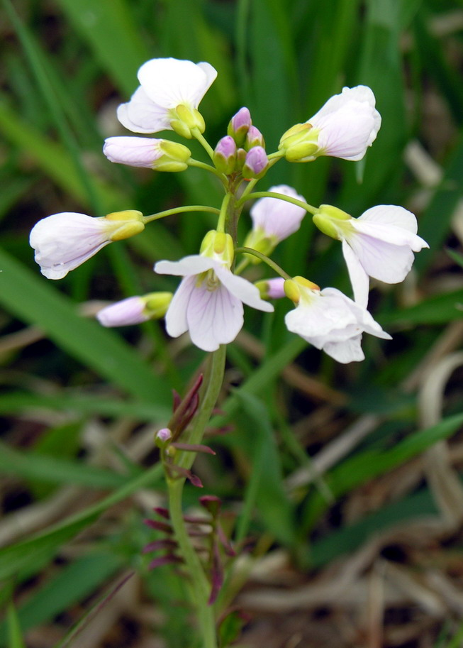 Pievinė kartenė (Cardamine pratensis) Šeima. Bastutiniai (Brassicaceae) Foto: Algirdas, 2006 m. gegužės 16 d., Lietuva.